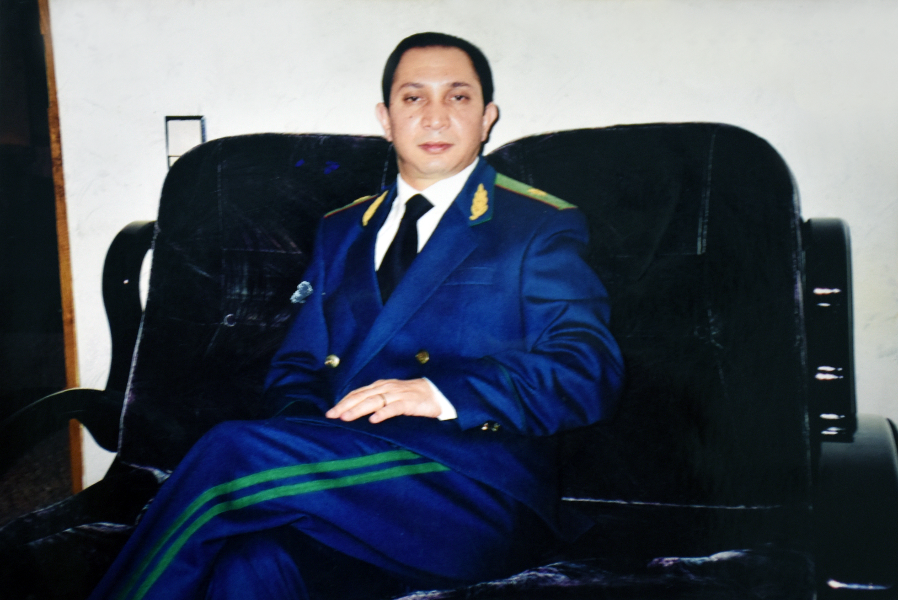 Əjdərov Təhmasib Hüseyn oğlu (17 aprel 1964, Bakı) — Azərbaycan və Ukrayna alimi; iqtisad elmləri doktoru (2002)